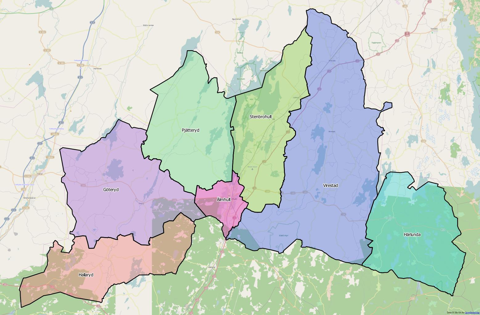 Distriktsindelningen i Älmhults kommun World file 68.73960371254483448 0 0 -68.73960371254483448 1522125.32565839821472764 7713328.22345083858817816